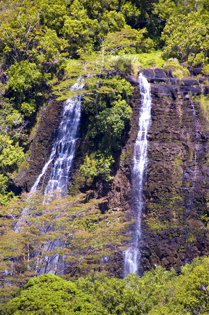 Opaeka'a Falls